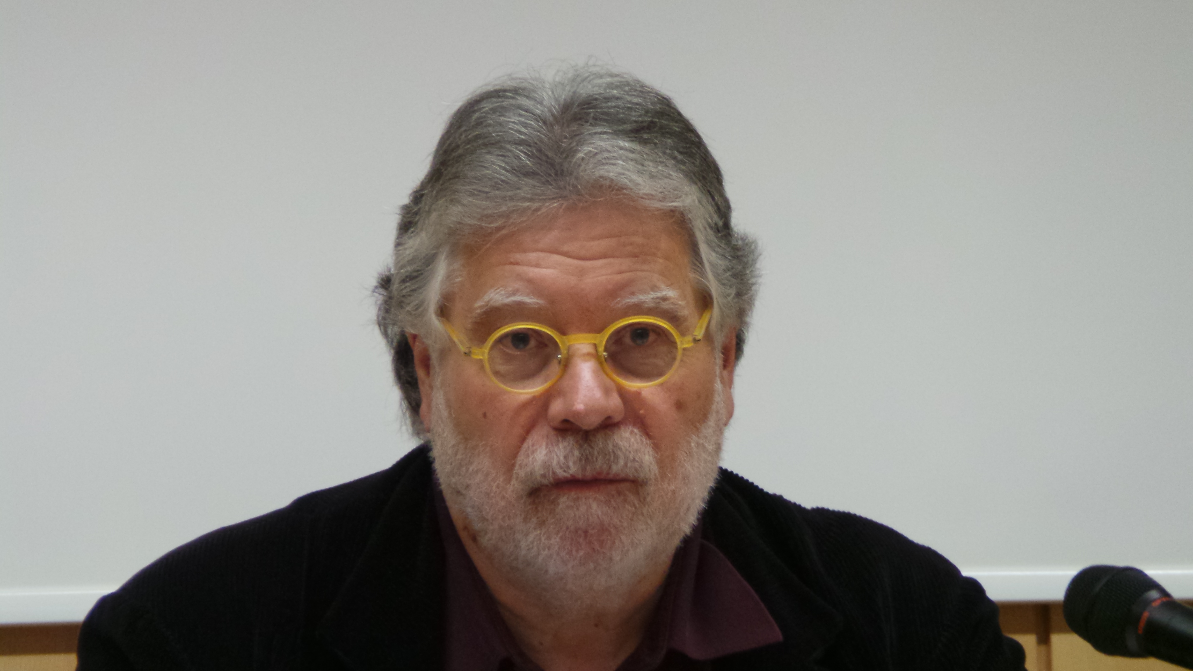 Joaquín Estafanía Diciembre 2015